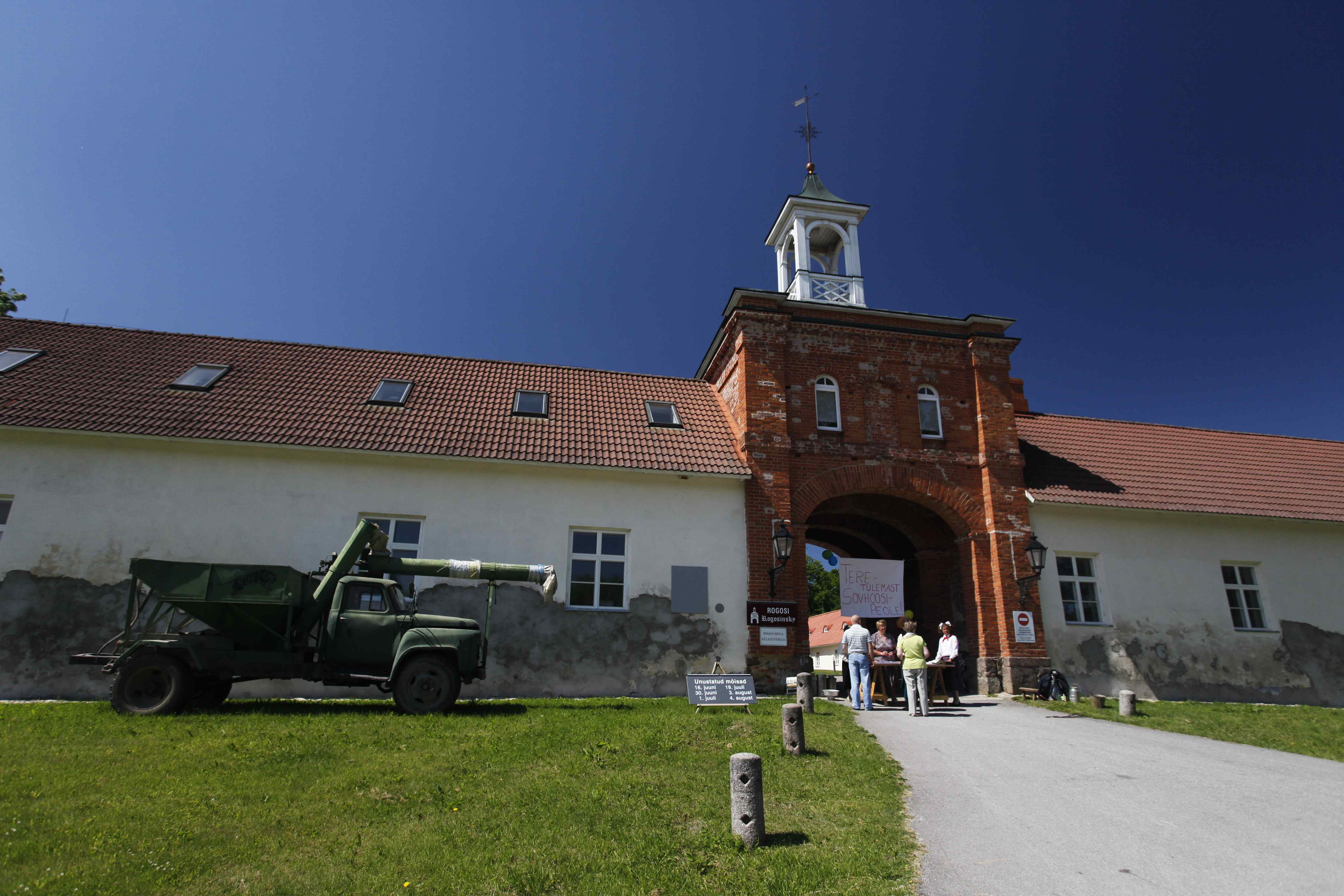 Rogosi mõisa sissesõiduvärav kellatorniga